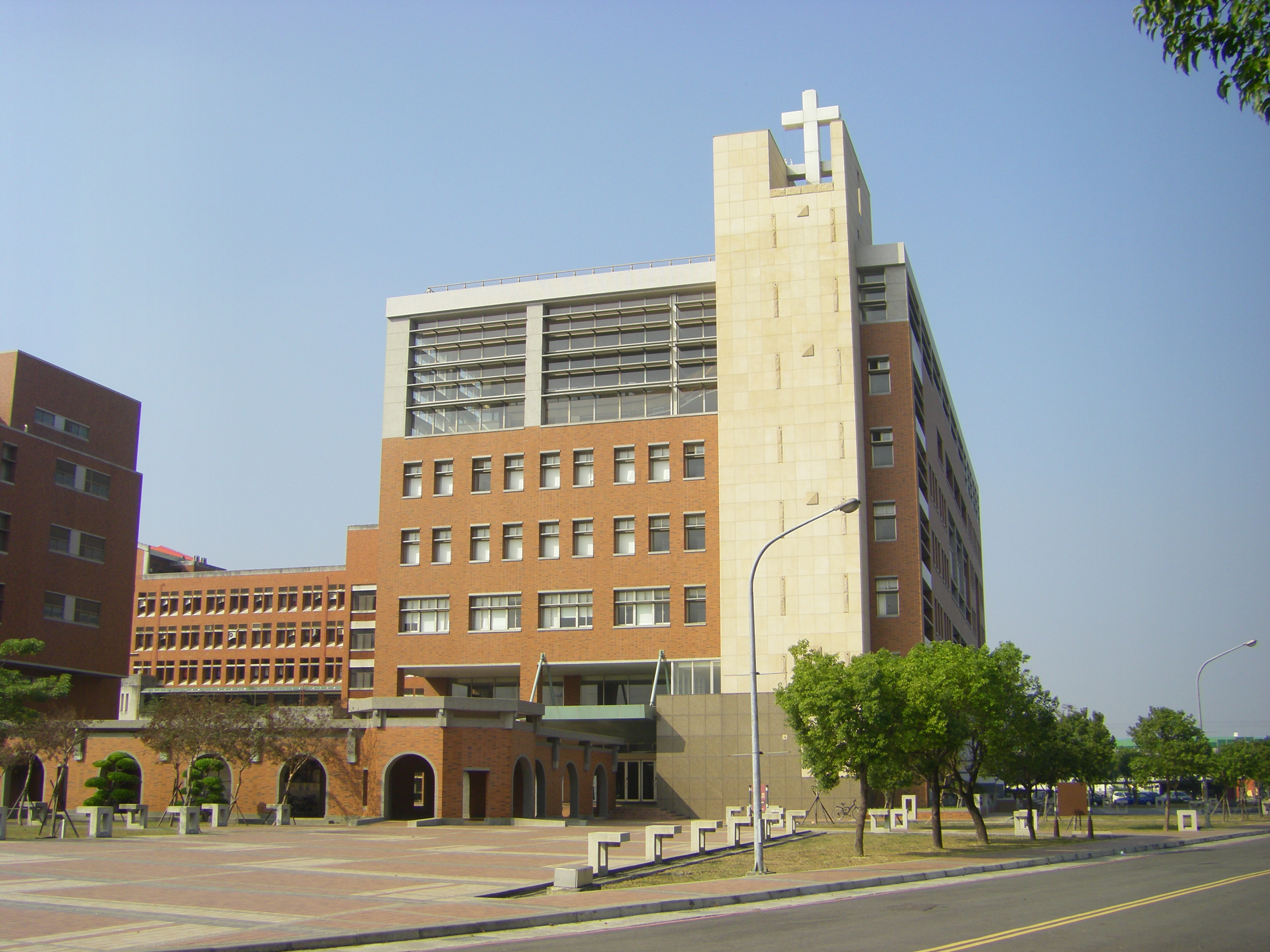 中文（台灣）: 長榮大學行政大樓